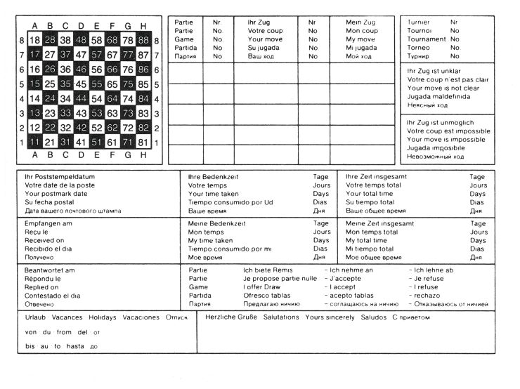 Postcard for correspondence chess